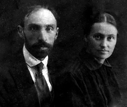 Шик Михаил Владимирович (1887—1937) и Шаховская-Шик Наталия Дмитриевна (1890-1942)